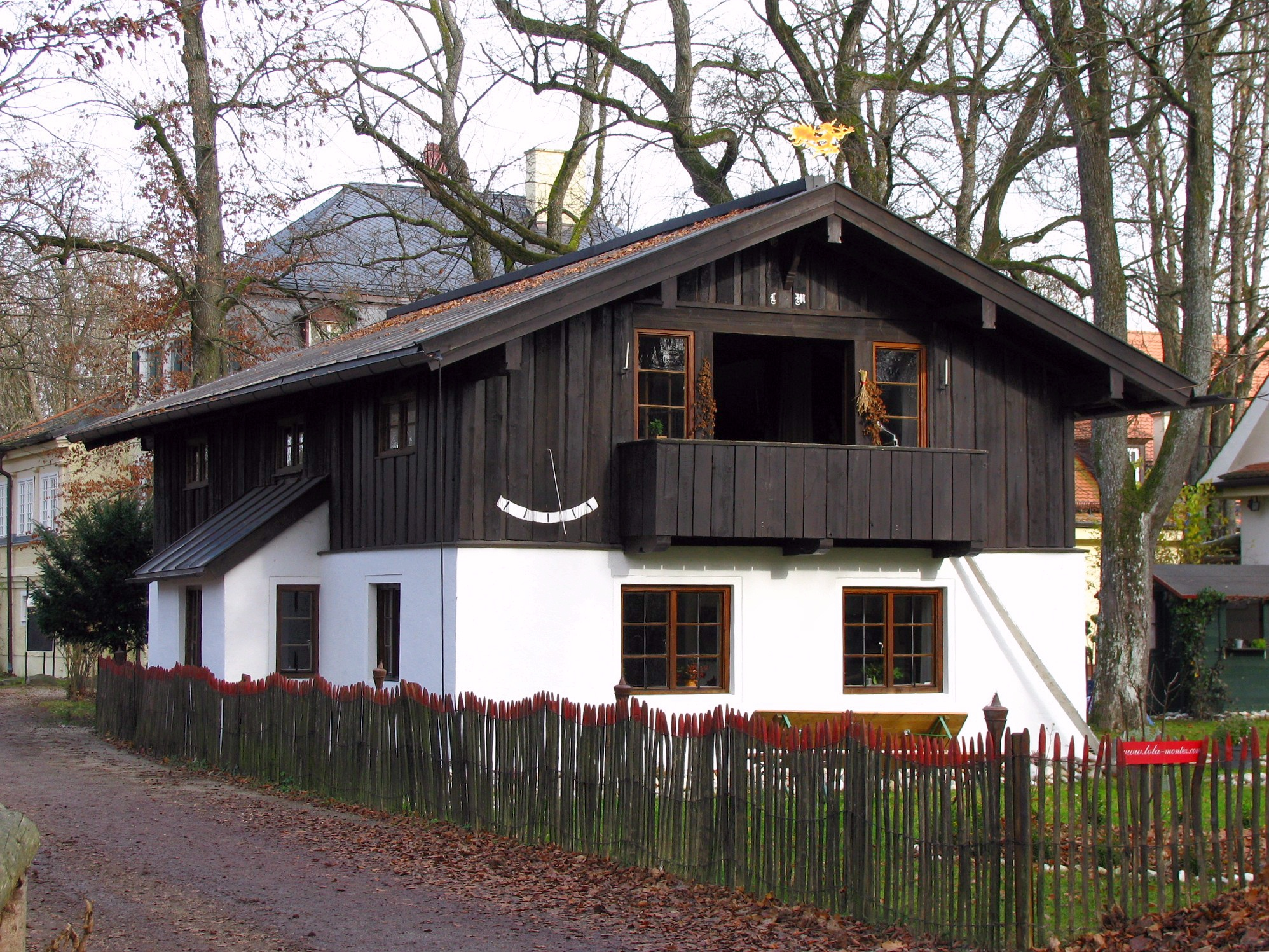 Das Lola-Montez-Haus, auch „königliches Liebesnest“, ein kleines Gebäude im Schweizer Landhausstil am Isarhochufer im Münchner Stadtteil Harlaching